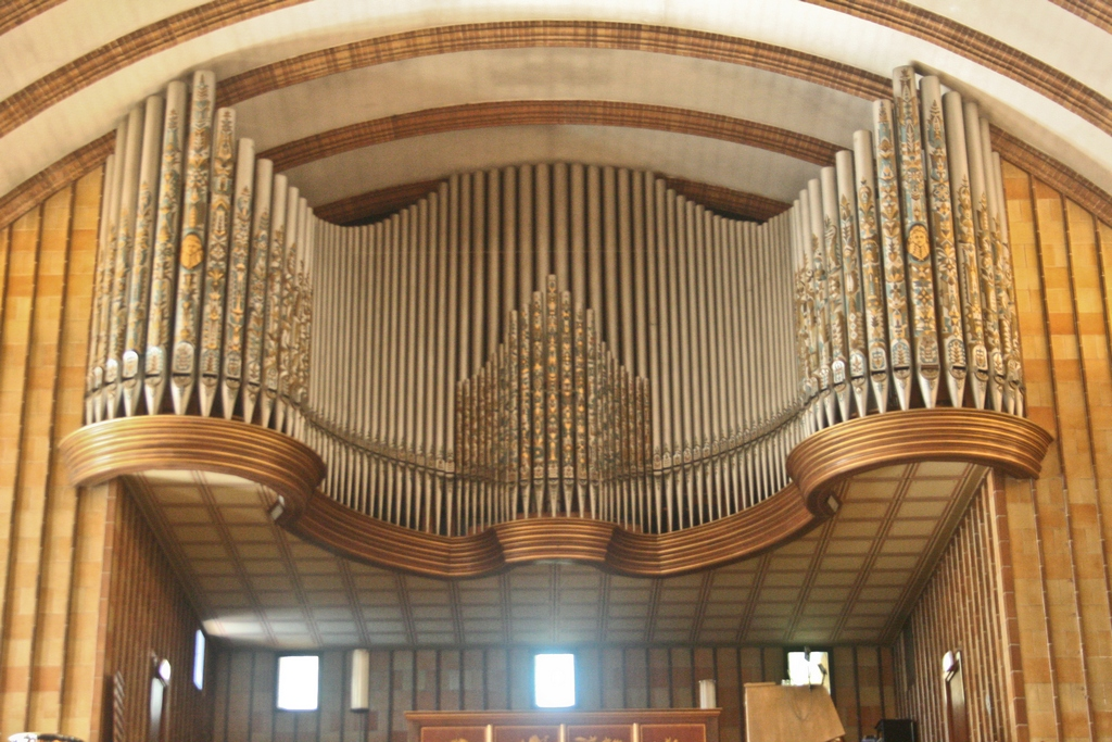 Orgel der Martin-Luther-Gedächtniskirche in Berlin-Mariendorf, die vor ihrer Verwendung in Berlin beim 7. Reichsparteitag der NSDAP am 15. September 1935 in Nürnberg verwendet wurde (bei dem die NS-Rassegesetze beschlossen wurden).